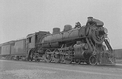 Canadian scenes. Locomotive